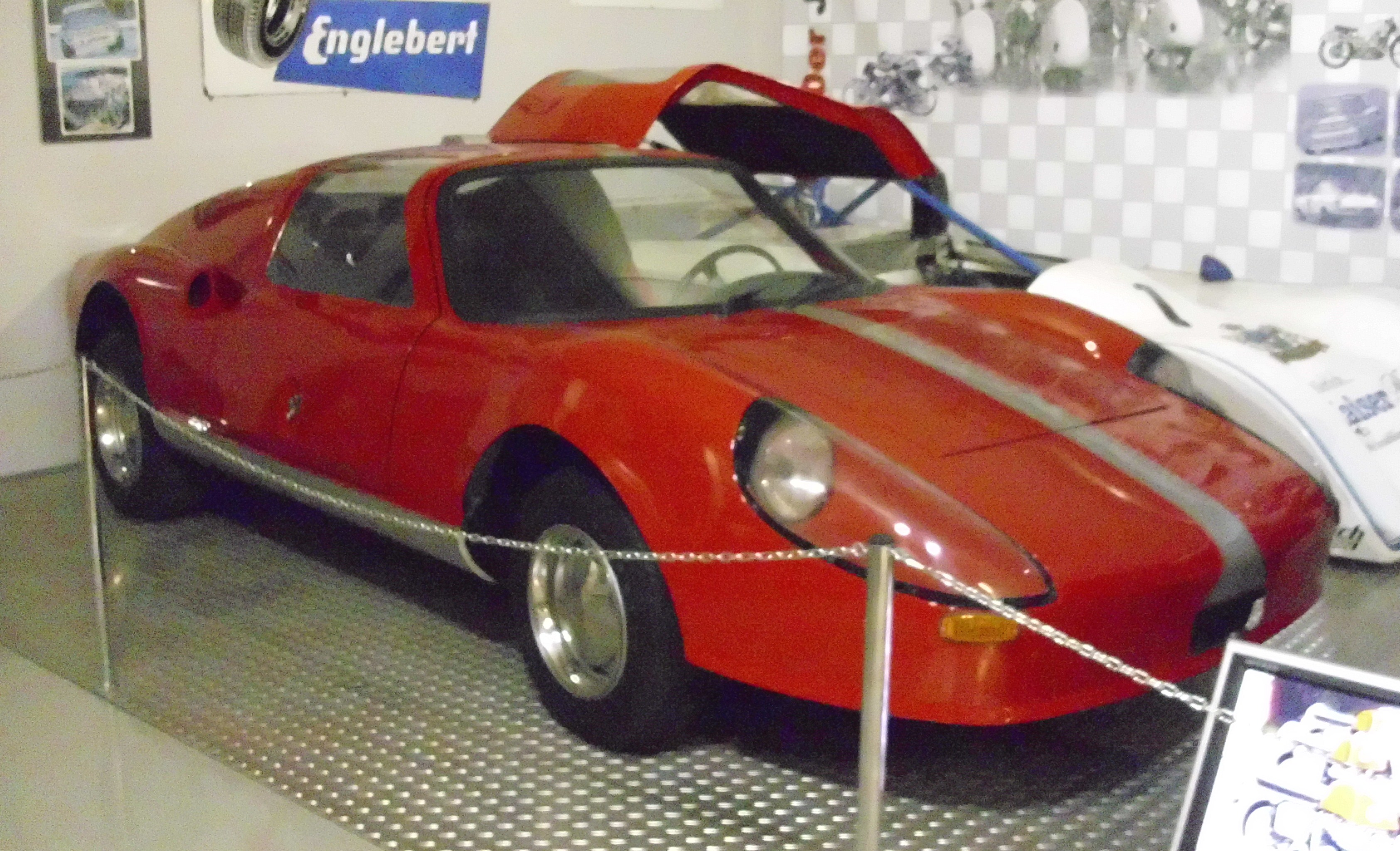 Kohlmus Scirocco 1969-1972